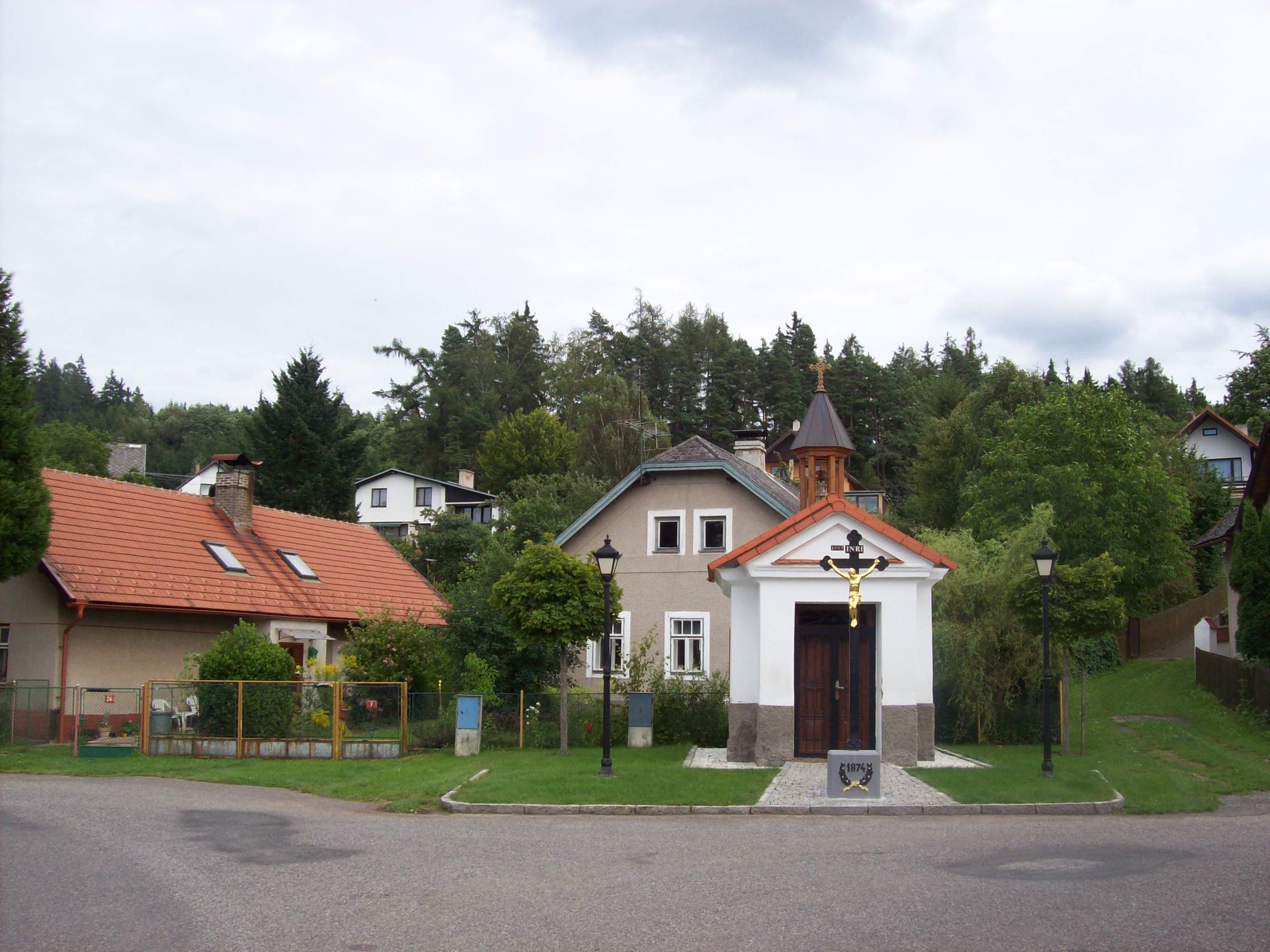 Neřežín, kaplička, za ní dům čp. 7, vlevo dům čp. 24. V pozadí zřejmě čp. 59, 48, 49.